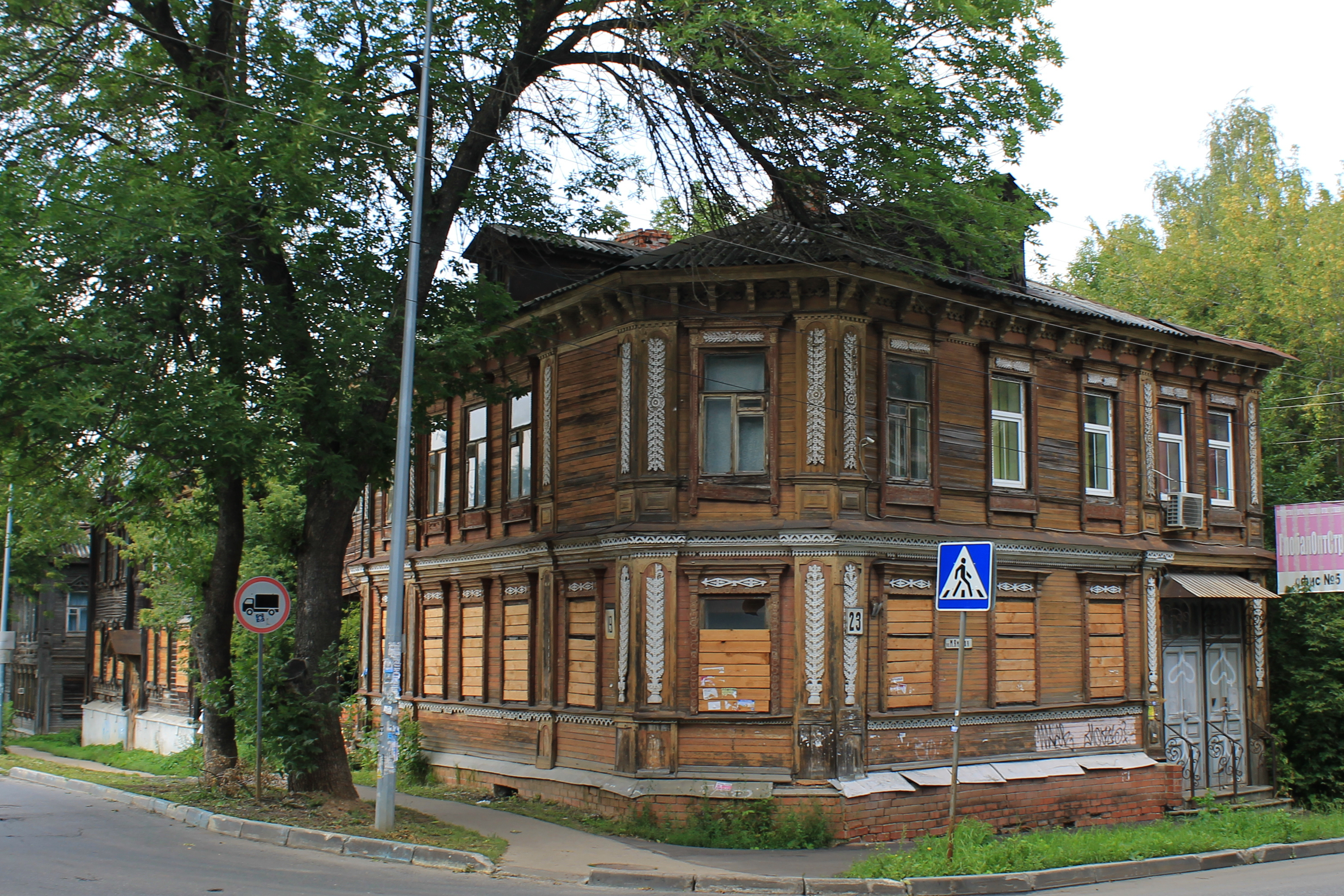 Жилой дом: улица Малая Ямская, 23 / улица Шевченко, 19, Нижний Новгород, Нижегородская область